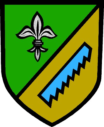 Wappen der Gemeinde Sankt Marein